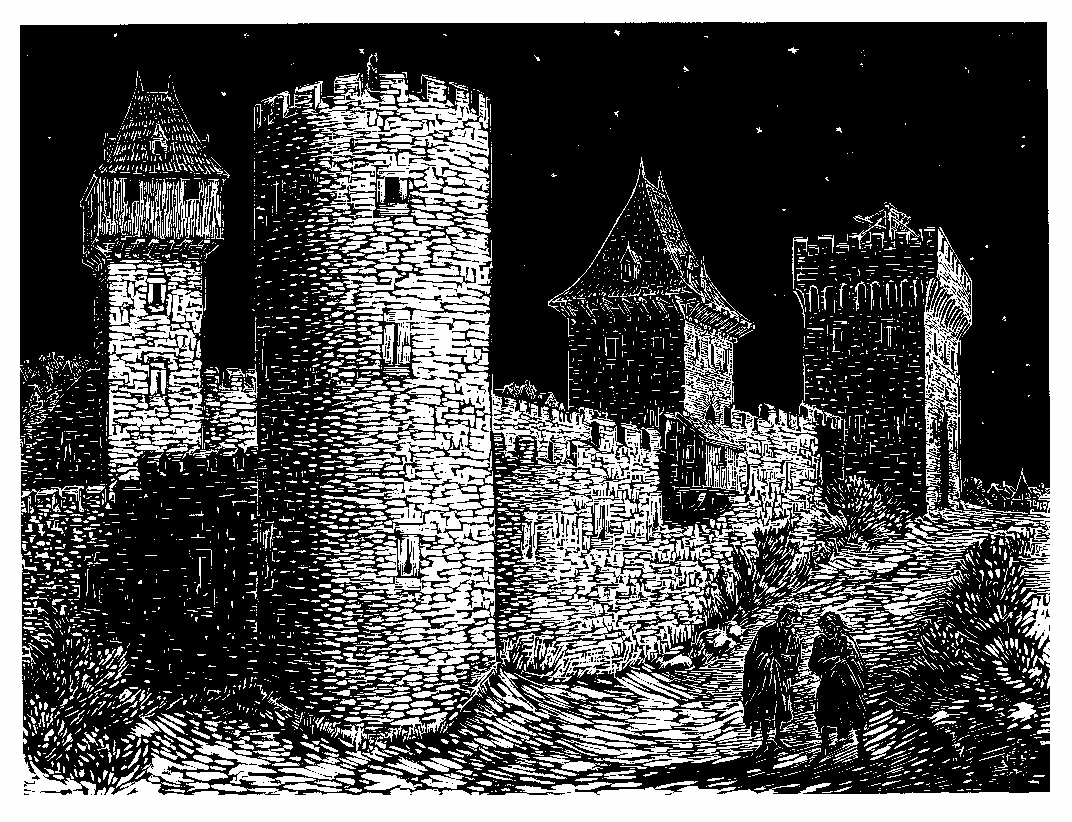 Jakobsstor, Aachen, im Vordergrund der "Trum ohne Namen (links) und der Eyerkeilturm (rechts)